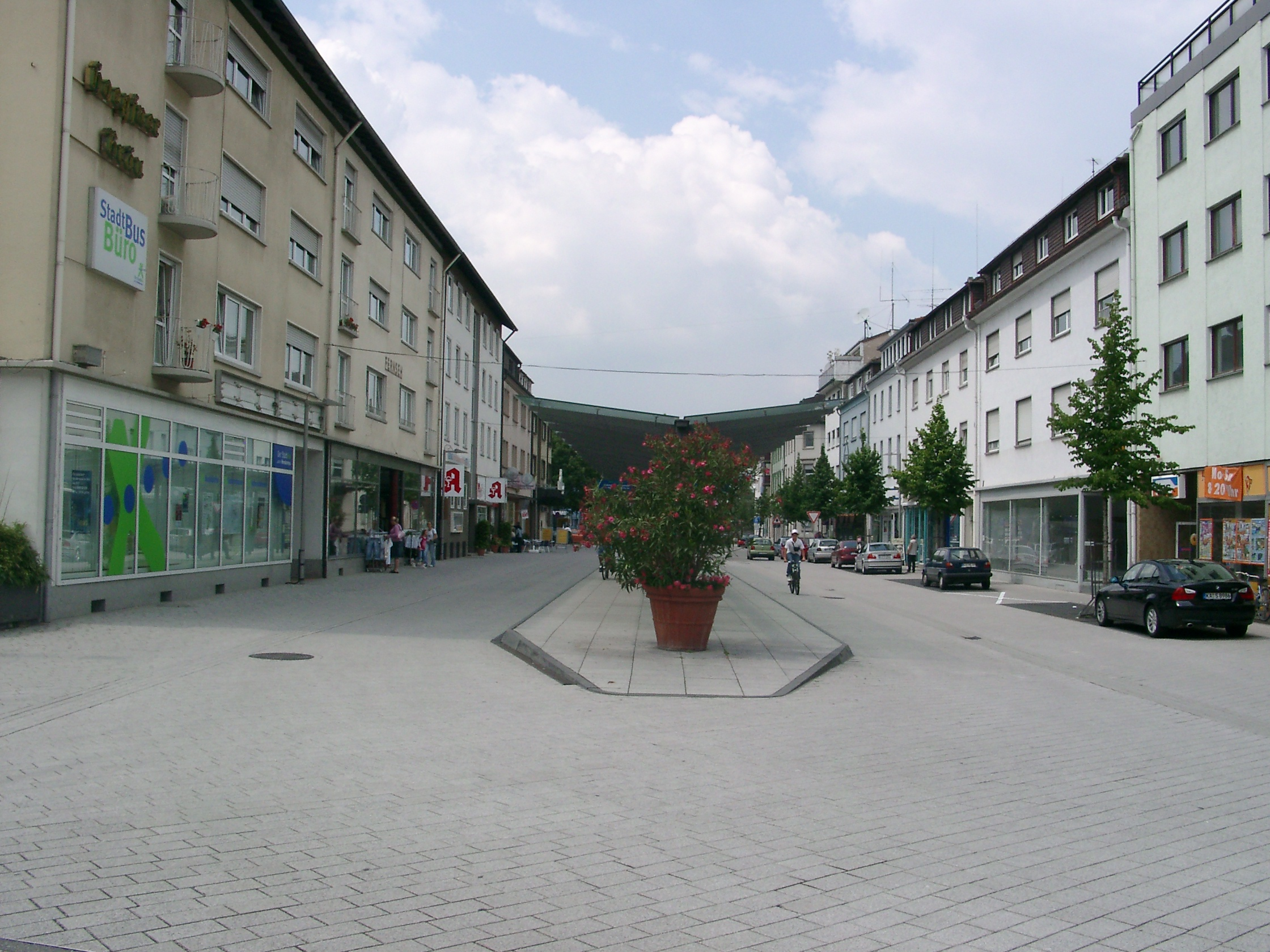 Bruchsal, Busbahnhof